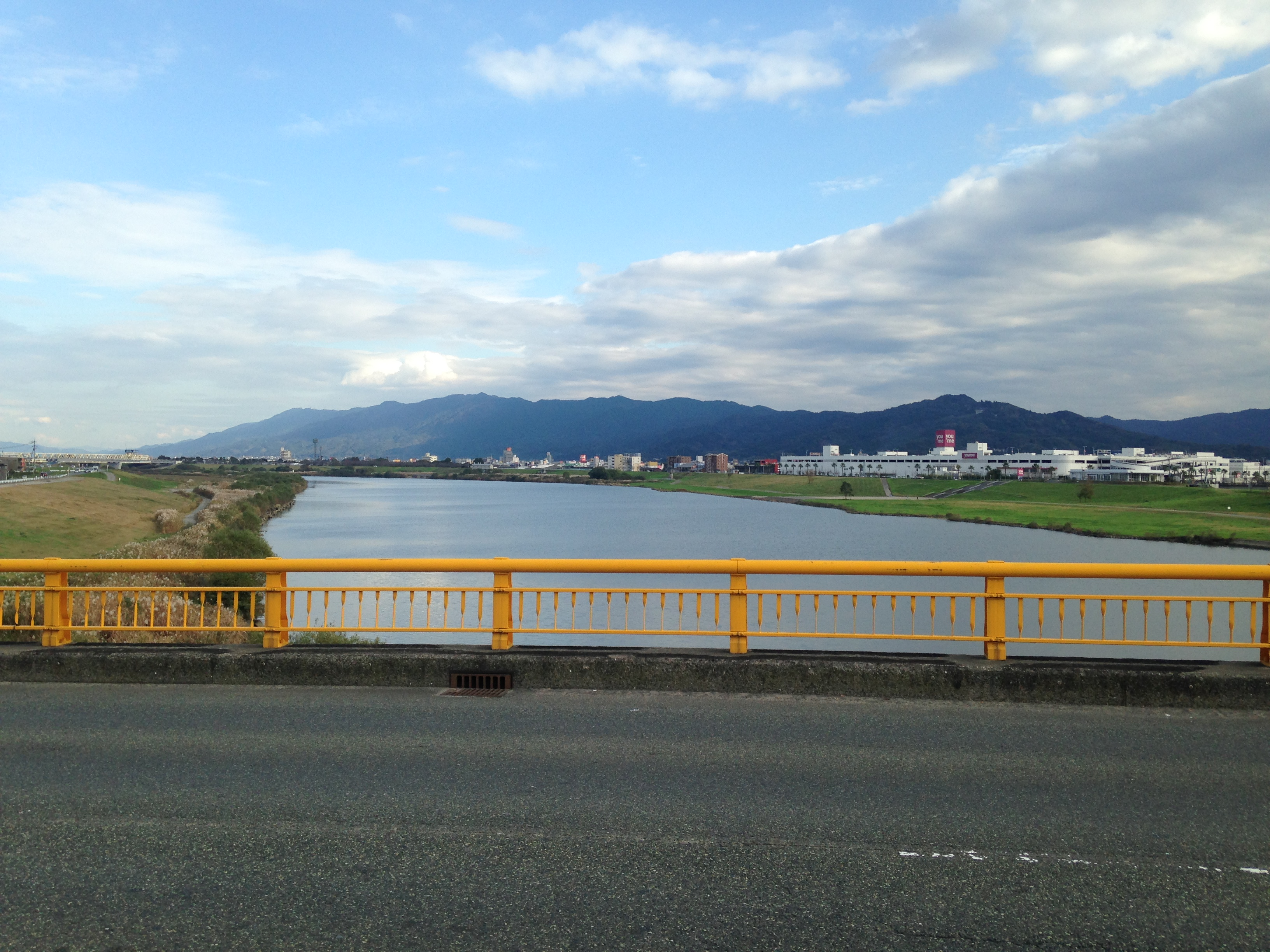 宮の陣橋より望む筑後川(上流側)